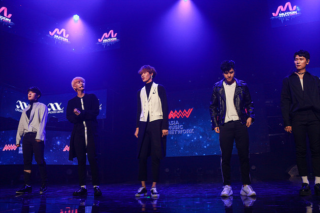 09월 26일 뮤콘 쇼케이스 MUCON Showcase